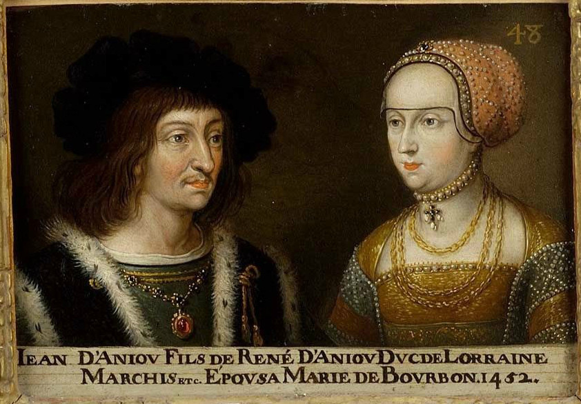 Portrait de Jean II, duc de Lorraine de 1453 à 1470, et de son épouse Marie de Bourbon. Ce tableau fait partie d'une suite d'une soixantaine de double-portraits représentant les ducs et duchesses de Lorraine ainsi que leurs ancêtres supposés. Musée des Offices, Florence (Inv. 1890, 641)